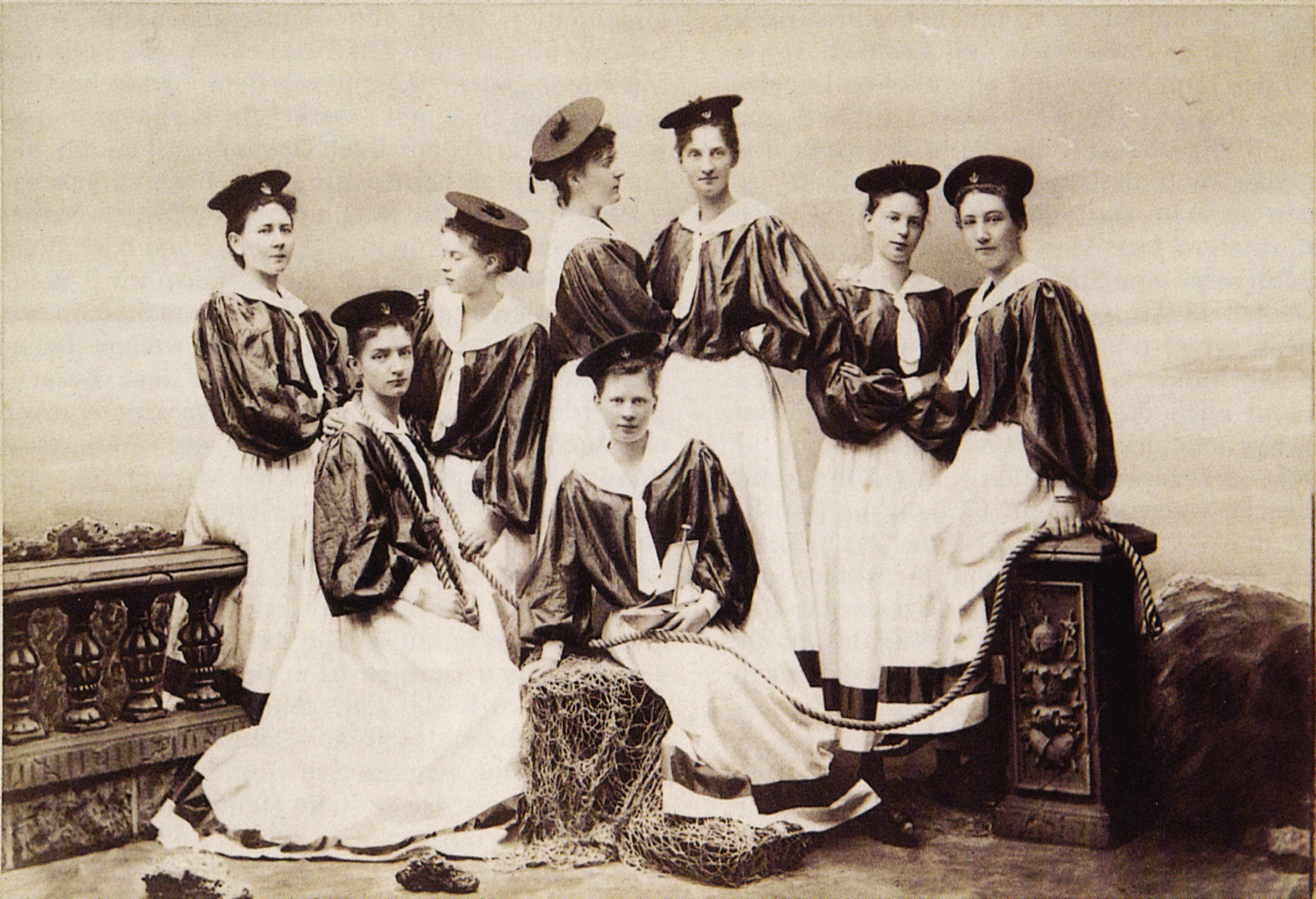 Historische Fotografie aus dem Bestand des Focke-Museums, Bremen, zum bremischen Hochzeitsbrauch des Kranzbindens. Auszüge aus den handschriftlichen Notizen auf der Rückseite des Fotos: „Aufführung beim Kranzbinden Herr von Basse u. Frau Frieda Bode“, „d. 27. Novemb. 1895“.